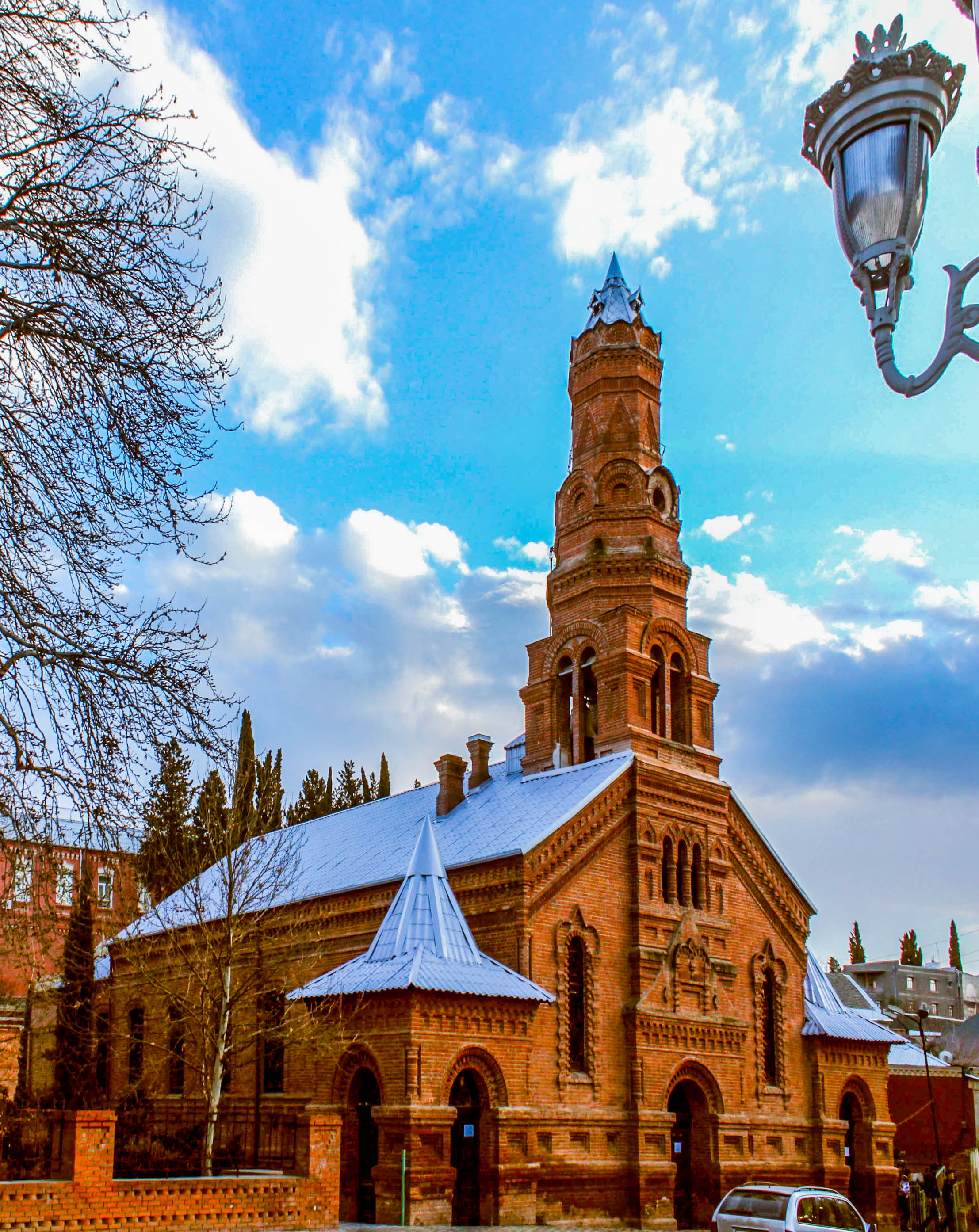 Gəncə lüteran kilsəsi